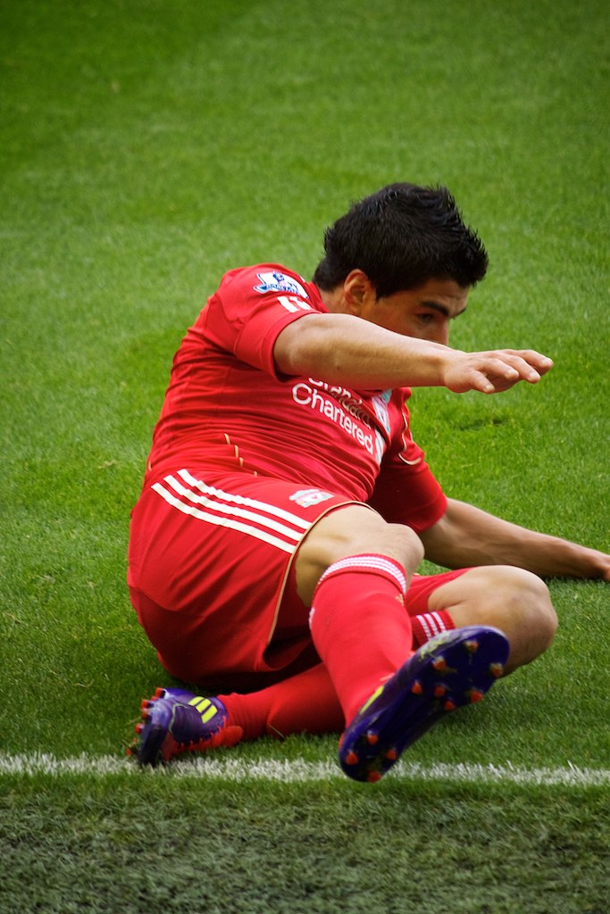 Liverpool vs Bolton 27/08/2011